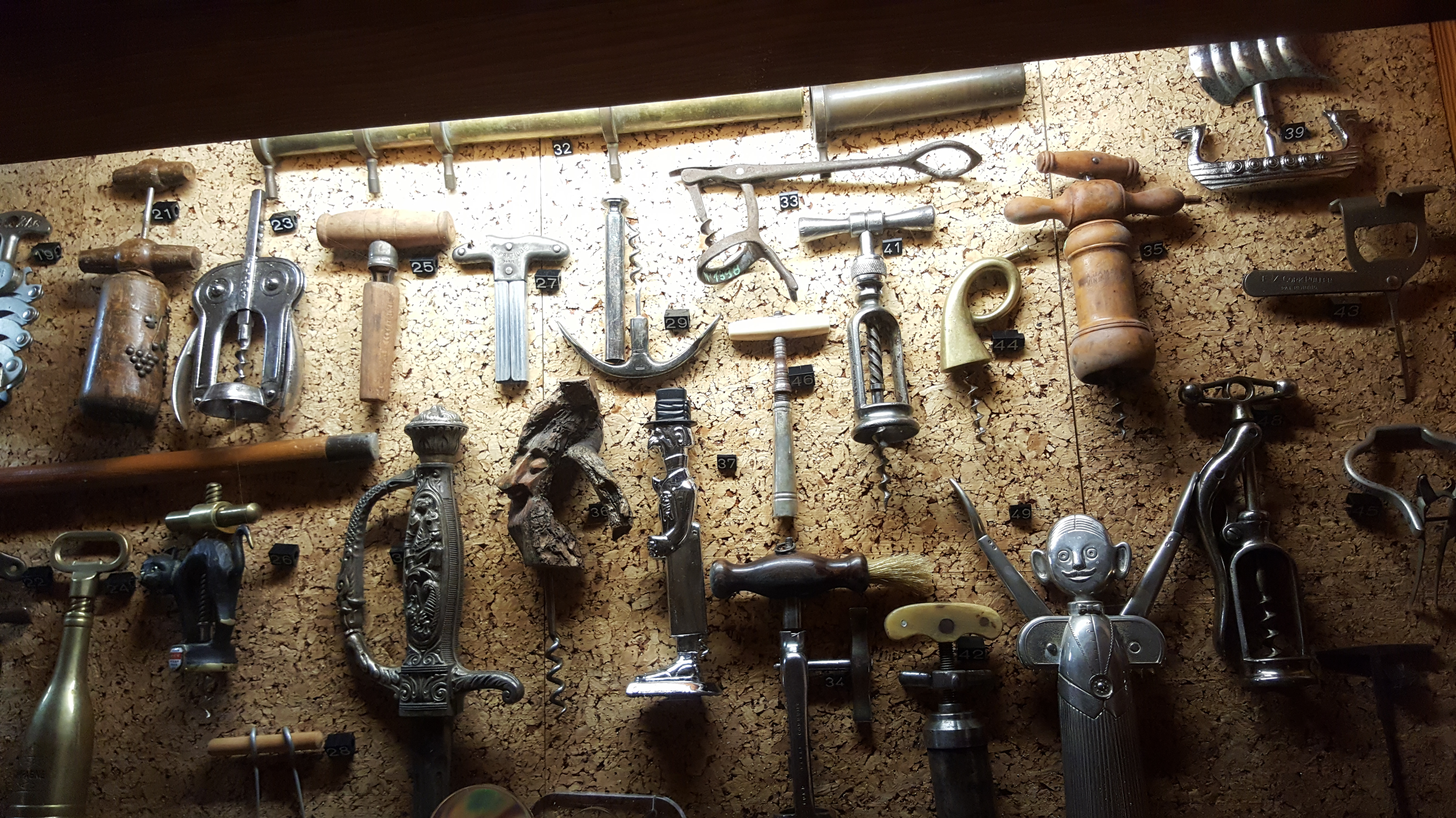 Muzeum wina w Paryżu